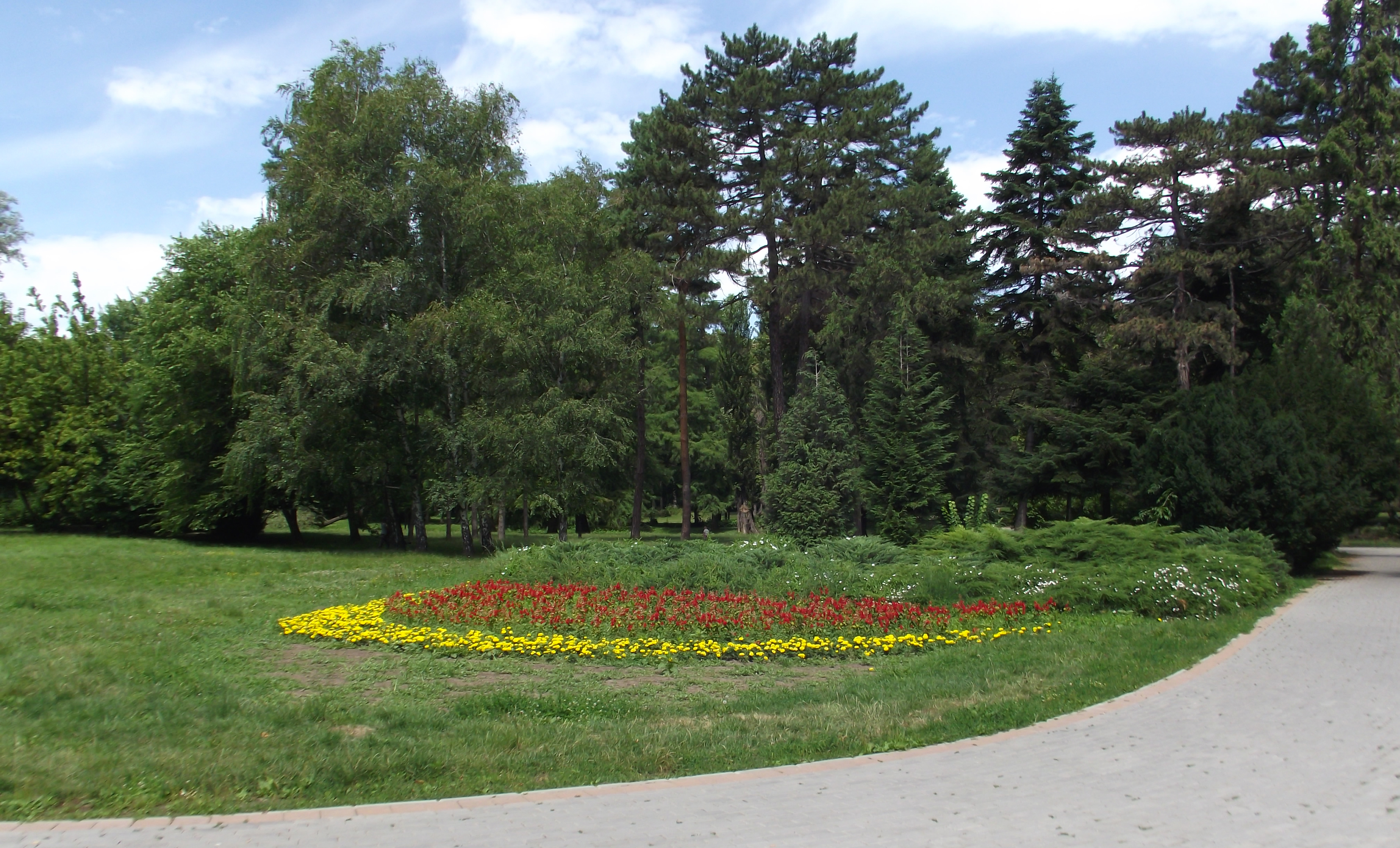 Ово је фотографија заштићеног природног добра у Србији под шифром: СП092 This is a a photo of a natural area in Serbia with ID: СП092